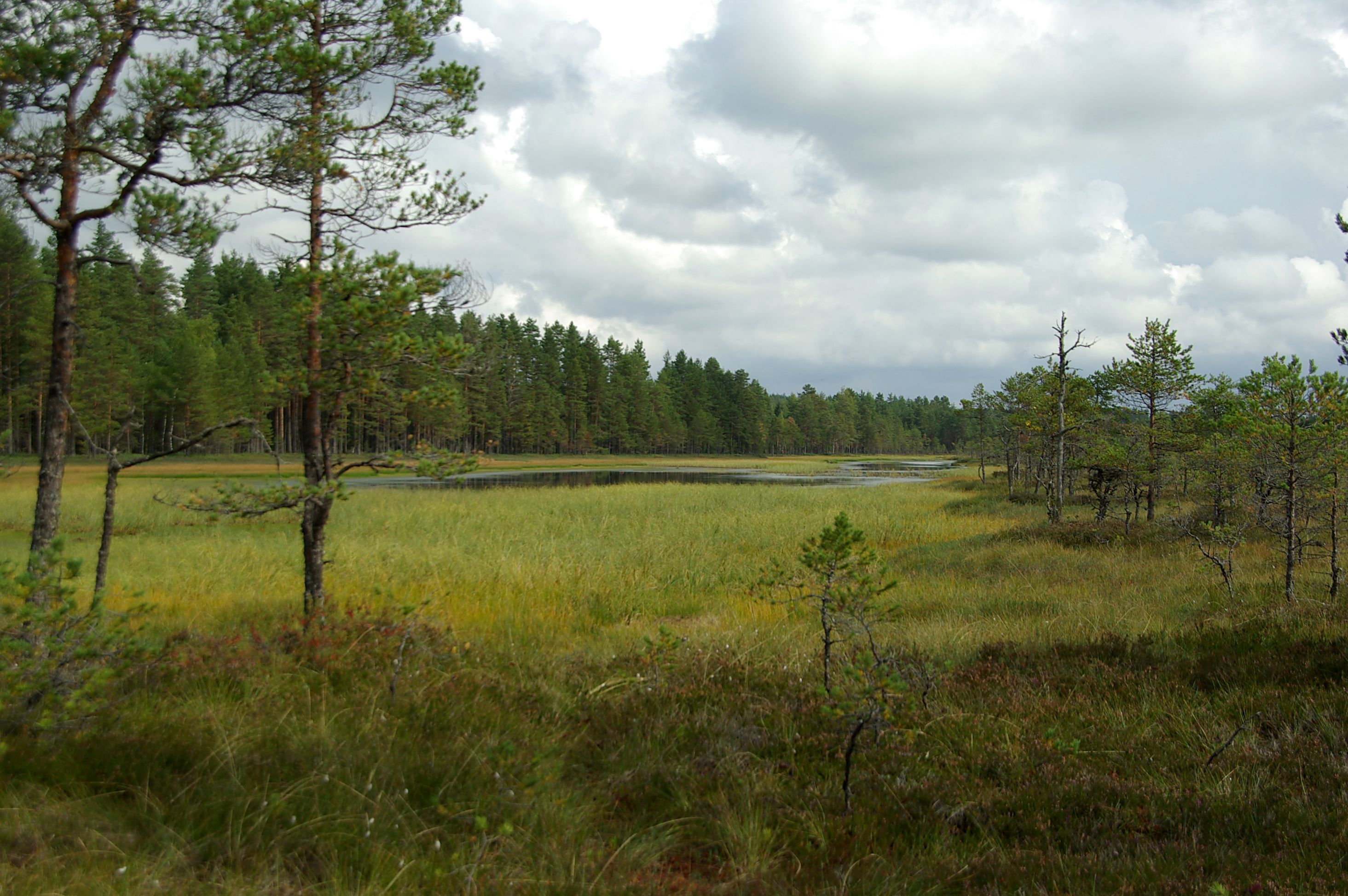 Järvi Piklaugas on Harjumaal Kuusalu vallas Suru ja Koitjärve külade lähedal asuv looduslik järv.